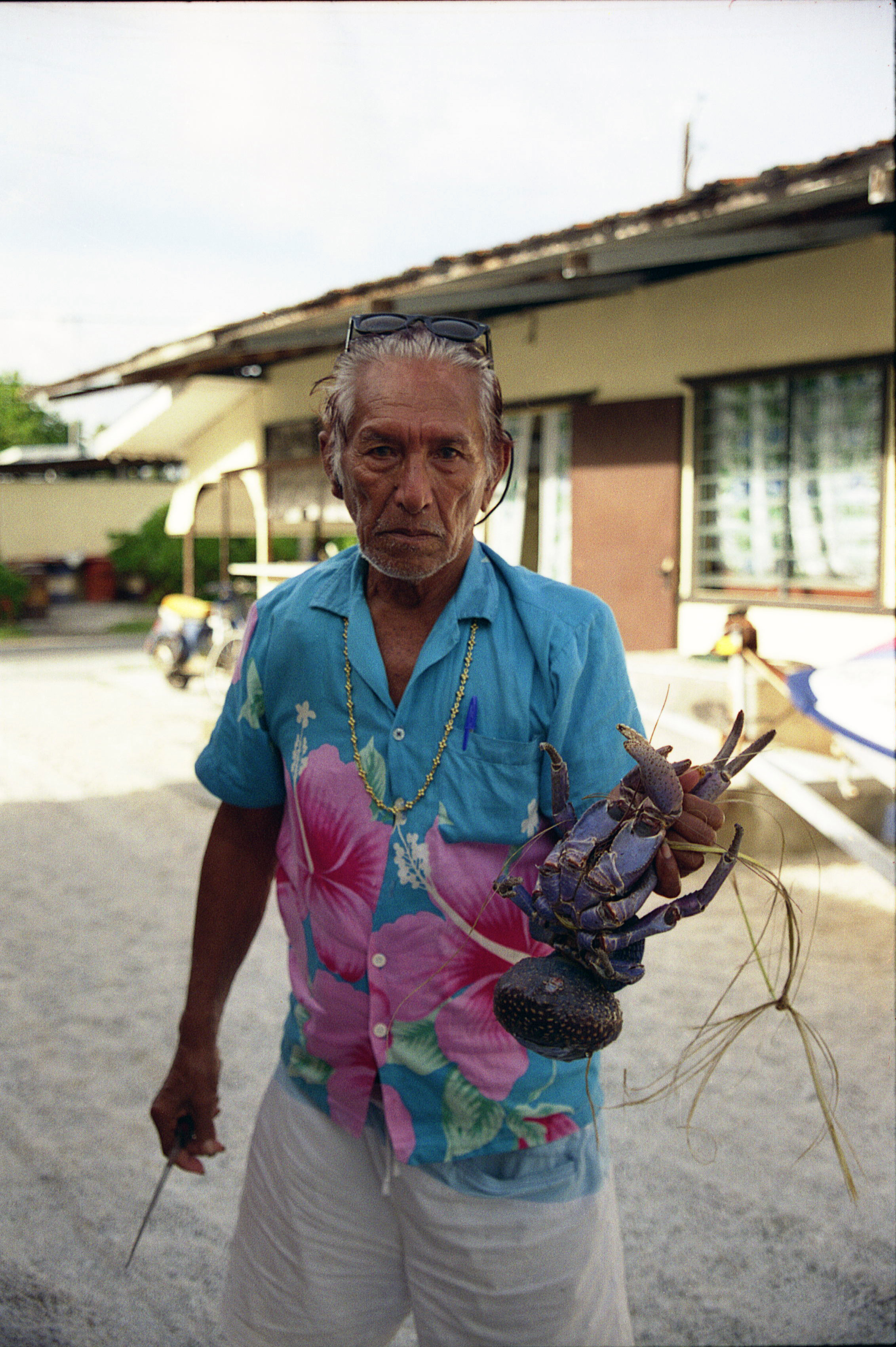 polynésie, tuamotu, crabe des cocotiers a Rangiroa